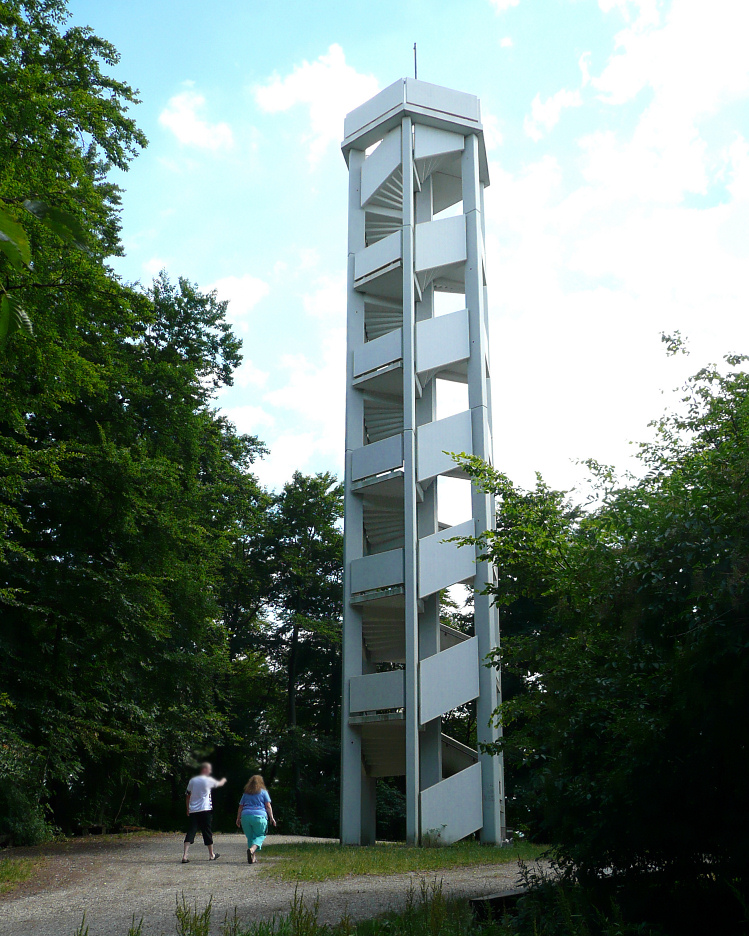 Himmelbergturm